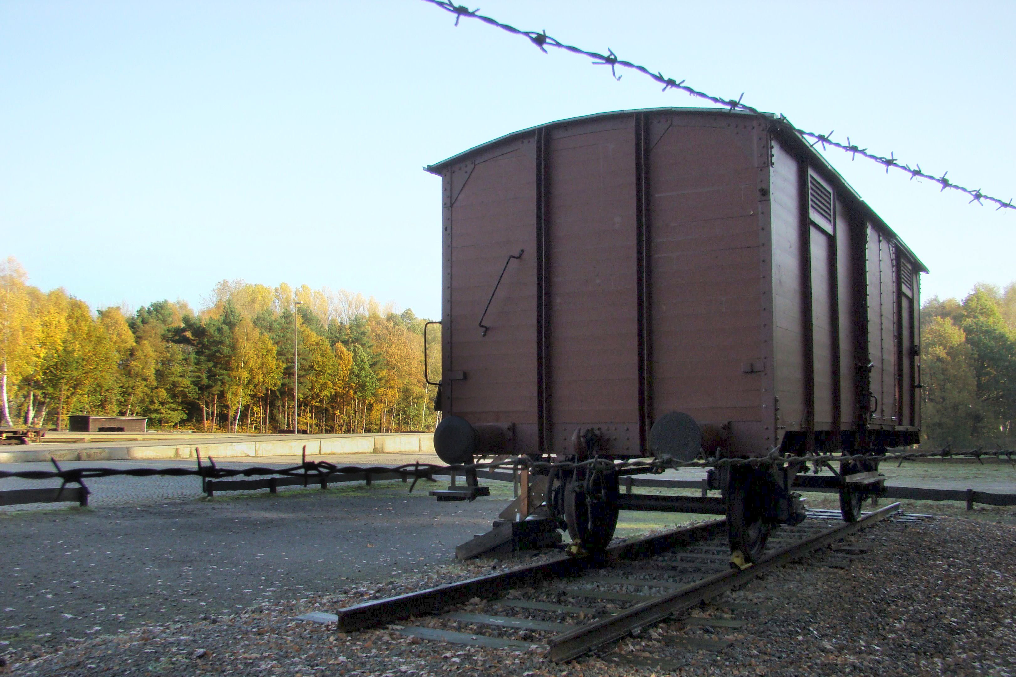 Gedeckter Güter-Waggon alter Bauart an der Verladerampe Bergen-Belsen